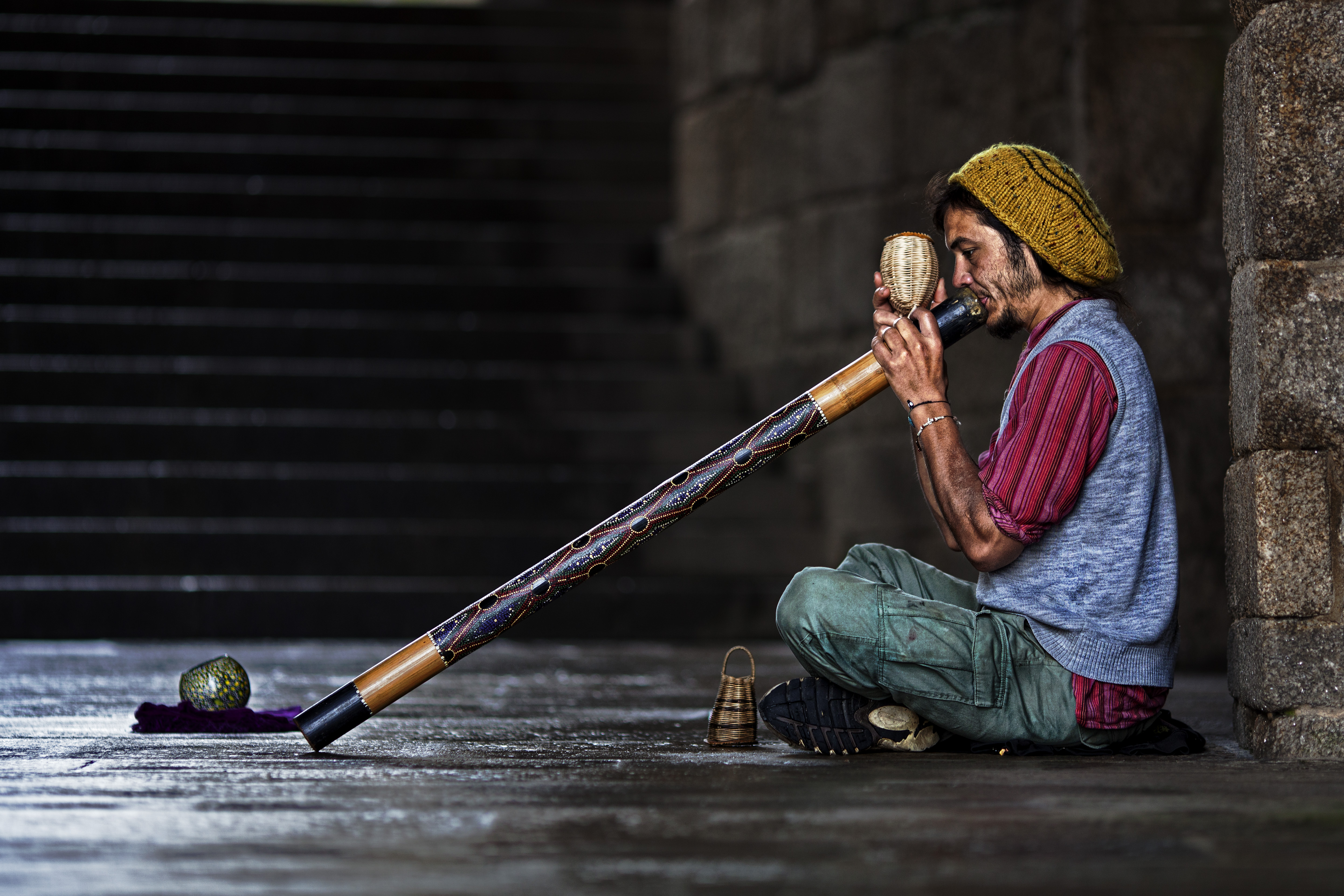 Digeridoo street player, Santiago de Compostela, Spain